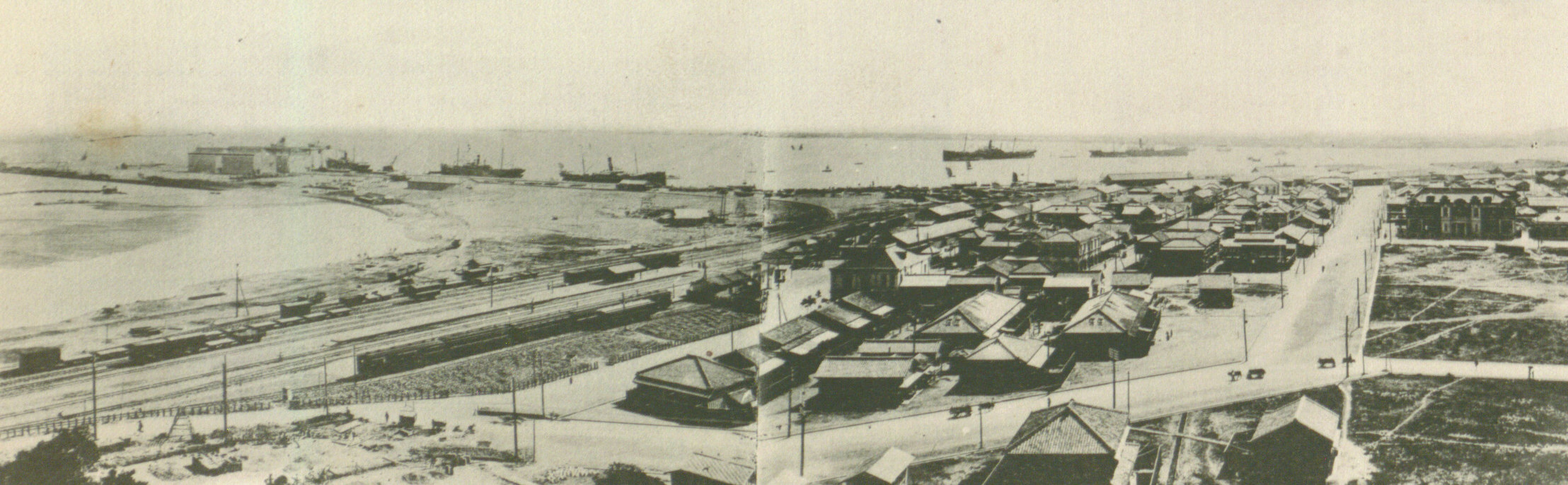 中文（台灣）: 打狗市街舊貌